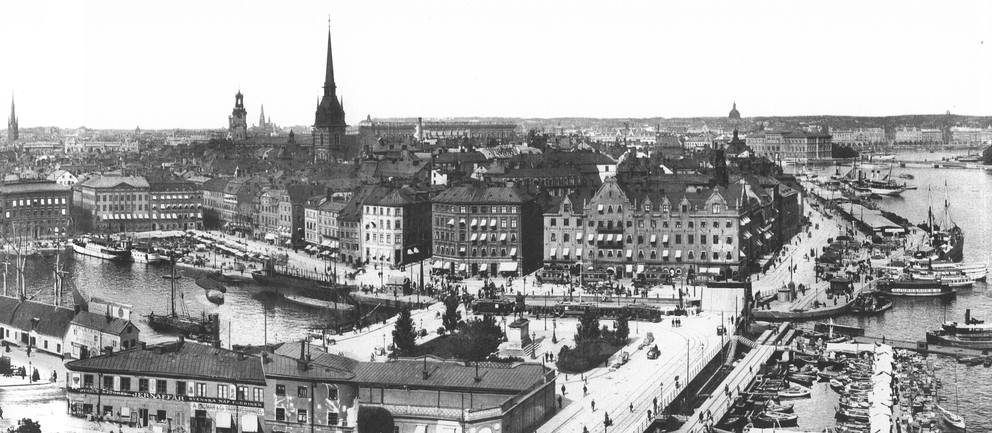 Utsikt över Stockholm från Katarinahissen på Södermalm, del 2